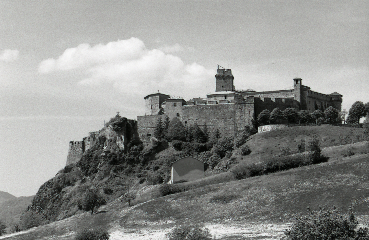 Servizio fotografico : Parma, 1976 / Paolo Monti. - Strisce: 7, Fotogrammi complessivi: 37 : Negativo b/n, gelatina bromuro d'argento/ pellicola ; 35 mm. - ((Sul portanegativi: N[I]K[MA]T FP4. - Occasione: Documentazione monumenti artistici Emilia-Romagna. - Fonte: Agenda di Paolo Monti: Leica 1501-3000 Controllo numerazione (1950-1978), presso Archivio Paolo Monti. - Fonte: Fattura di Paolo Monti: IV. Commesse/ Fattura n. 09/ Fotografie monumenti artistici Emilia-Romagna (1976/07/05), presso Archivio Paolo Monti